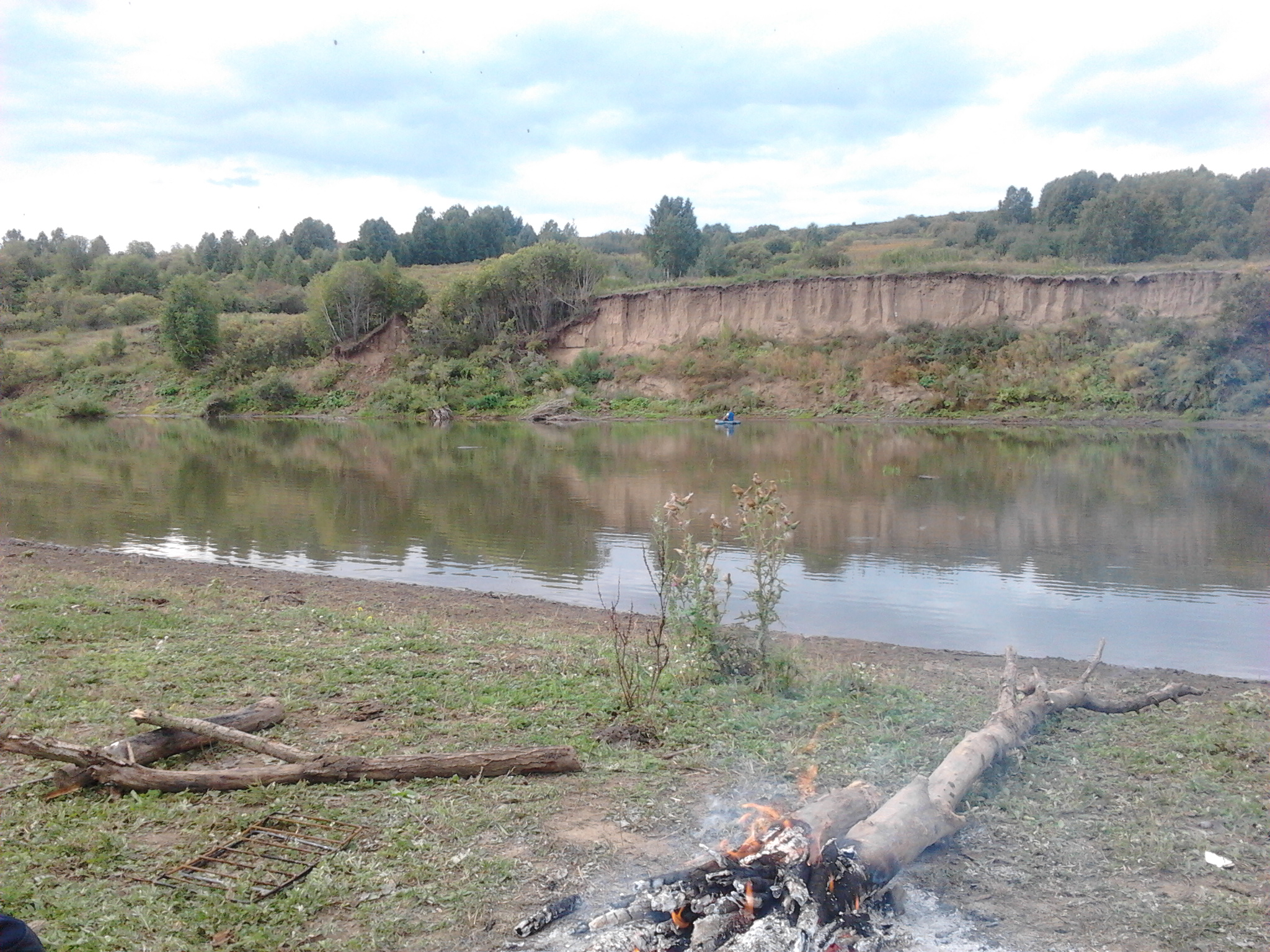 Костёр